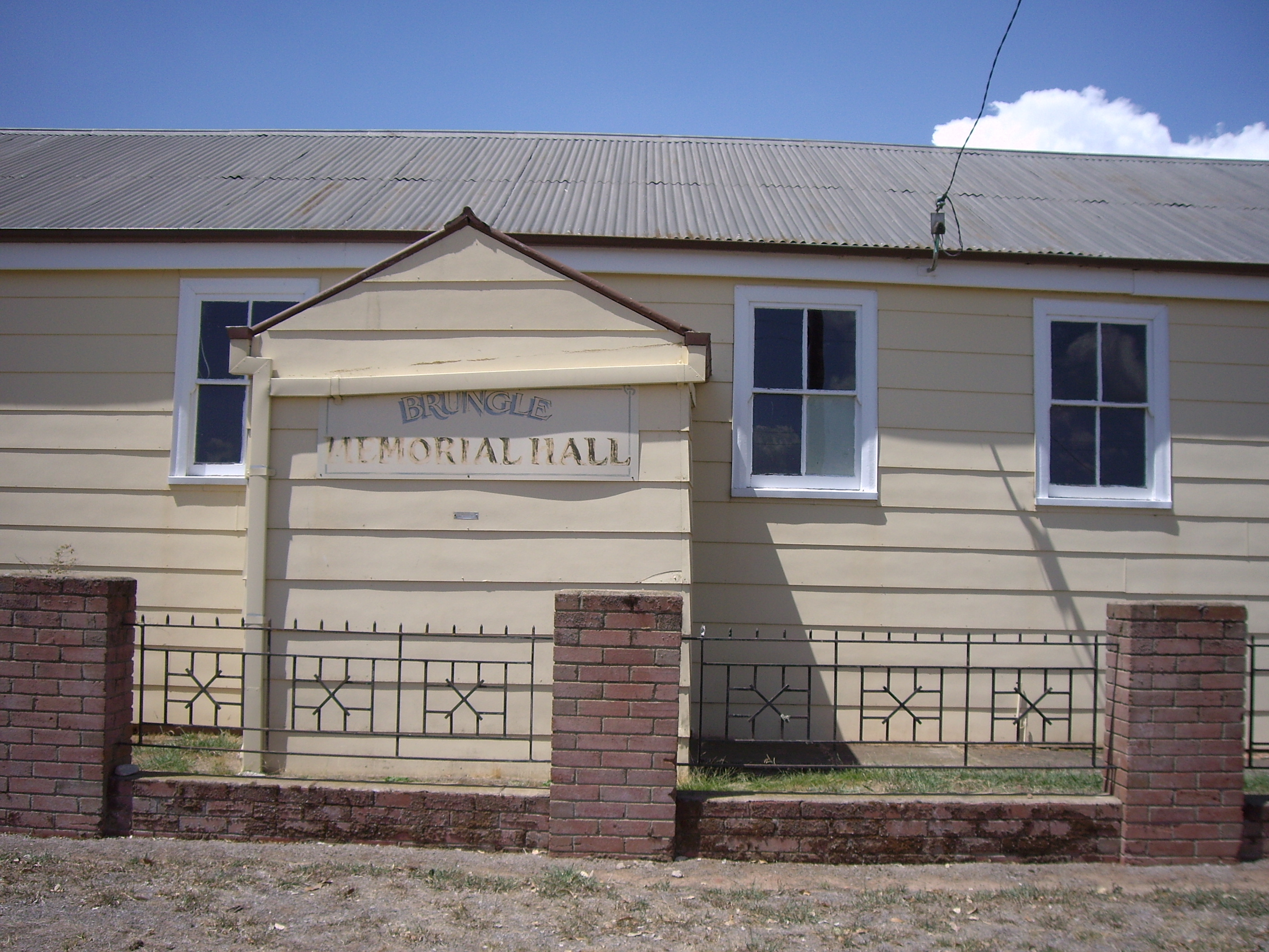 Brungle Memorial Hall